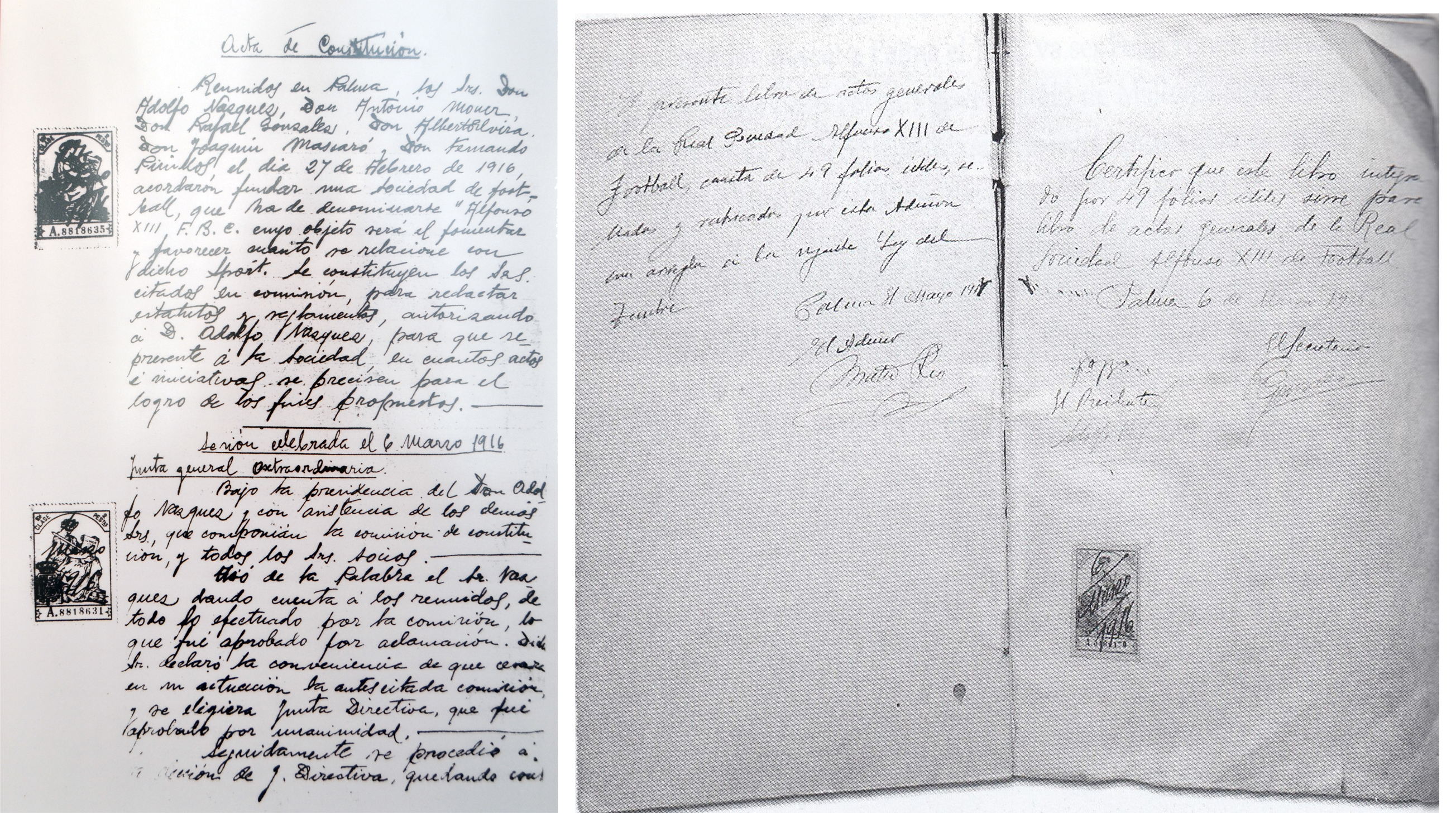 Acta fundacional del RCD Mallorca en 1916.